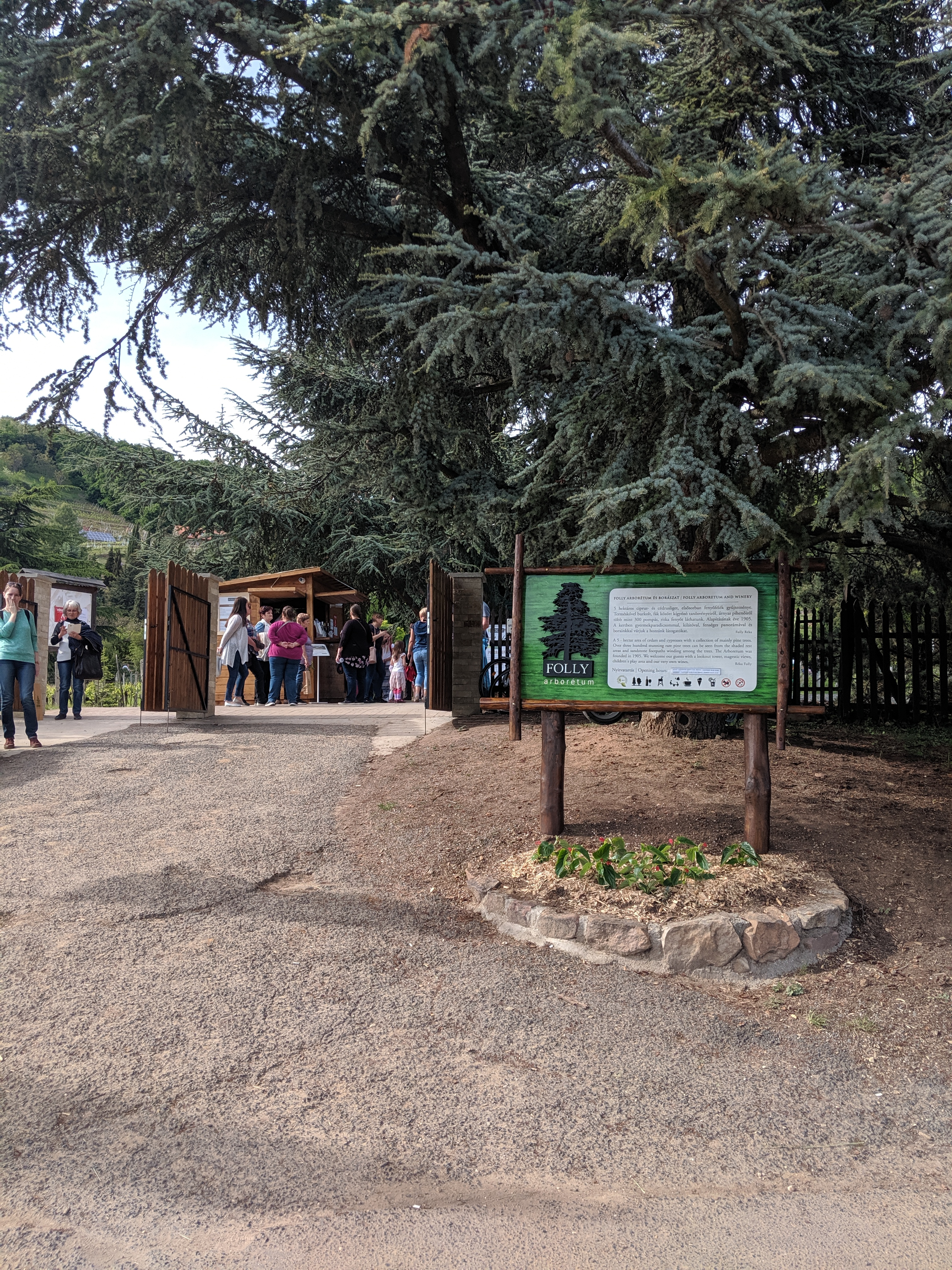 A Folly arborétum bejárata 2019. május 11. ingyenes nyilt nap Folly Arborétum és Borászat 8257 Badacsonyörs, Kápolnavölgyi út 25.